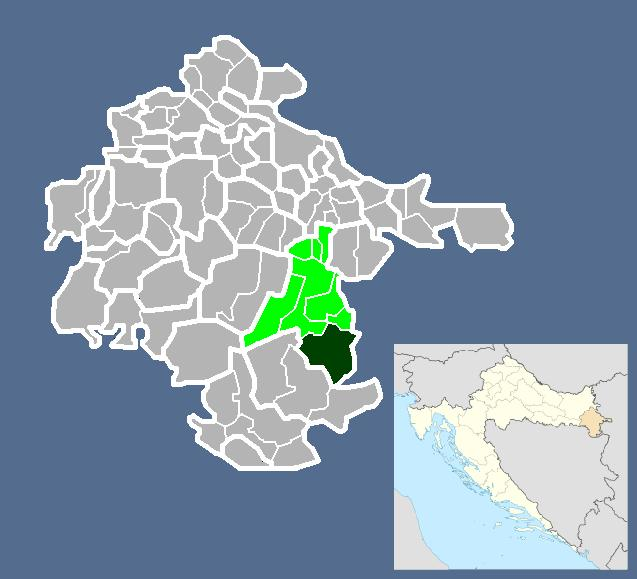 Српски (ћирилица): Насеље Липовац у Општини Нијемци.